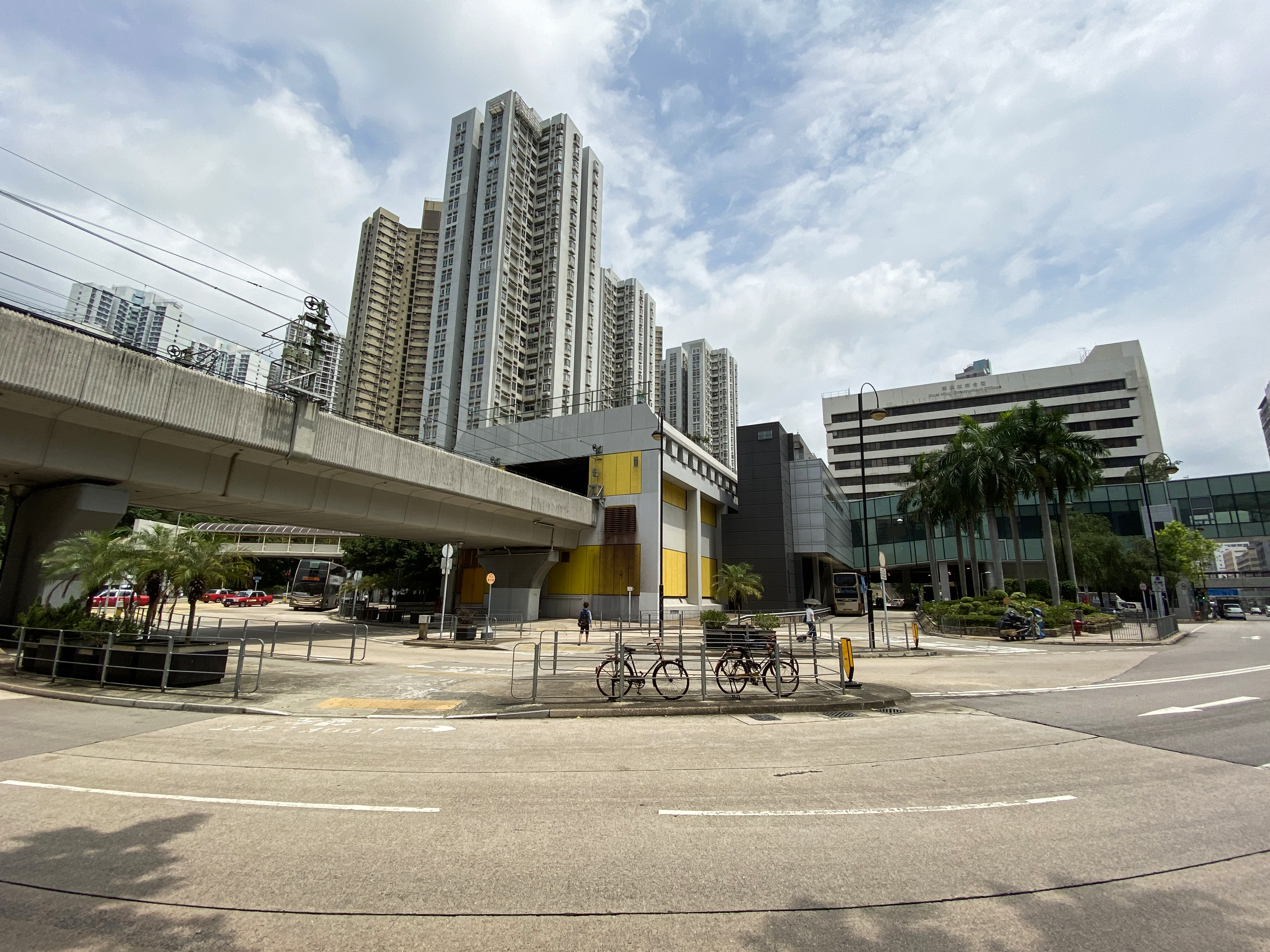 Kwai Hing Station